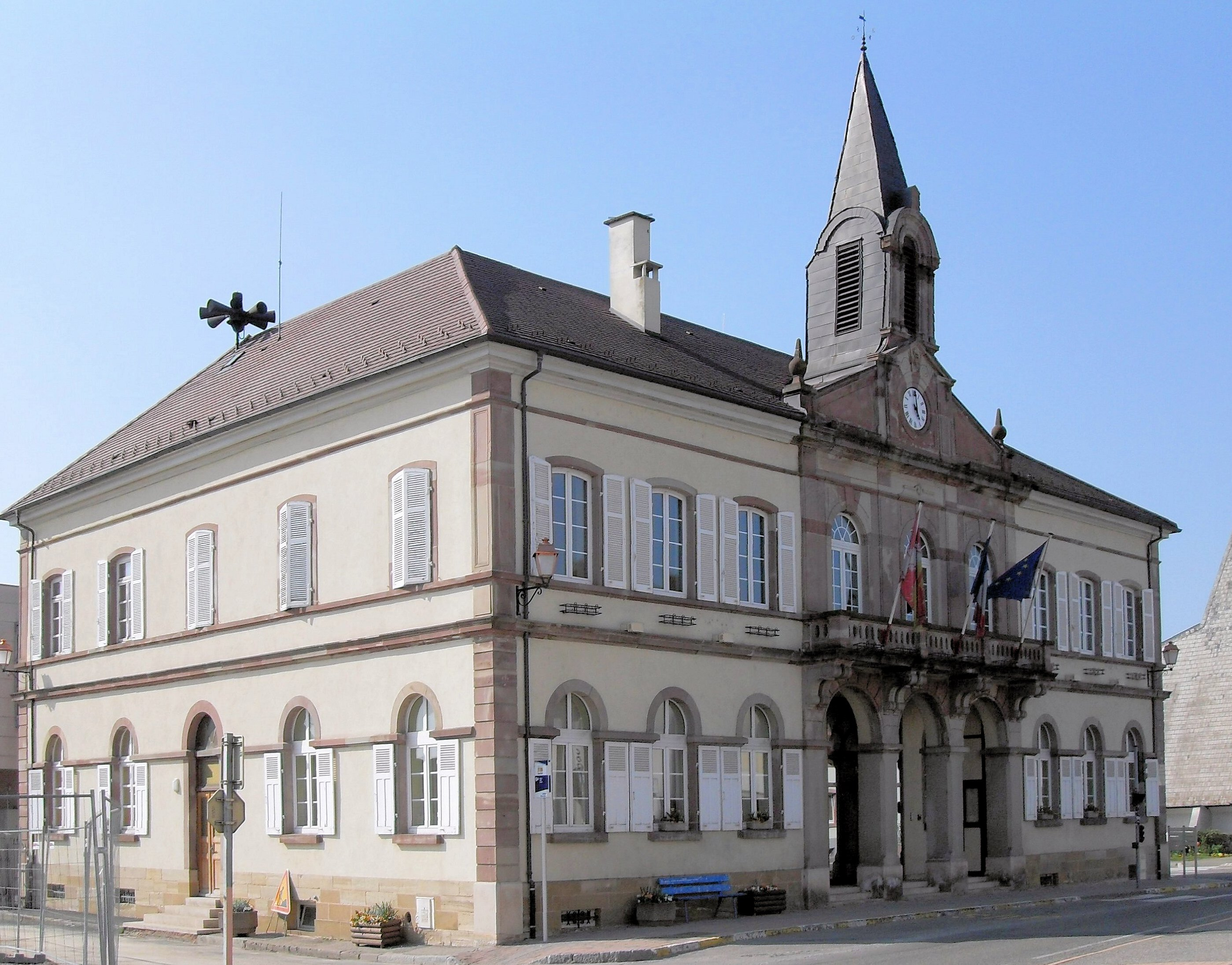 La mairie d'Illfurth